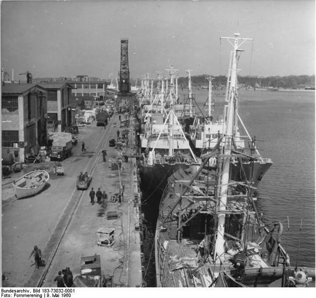 Zentralbild-Pommerening 9.5.1960 In Stralsund entstand größte Logger- und Trawlerfabrik der Welt. Die größte Logger- und Trawler-Fabrik der Welt entstand in den vergangenen Jahren zusammen mit der Volkswerft in Stralsund. Alle zwei bis drei Tage verlässt eines der Fischereifahrzeuge die Helling. Viele hundert dieser Schiffe, von denen ein großer Teil in die SU exportiert wurde, künden auf den internationalen Fangplätzen von dem Fleiß der Stralsunder Schiffbauer. In den nächsten Jahren wird hier am Strela-Sund mit dem Bau von "Tropic" begonnen, einem Fangfahrzeug für Reisen in den Südatlantik, das seiner Ausrüstung nach zu den modernsten der Welt gehören wird. UBz.: Viele Mitteltrawler liegen ständig am Ausrüstungskai der Werft. Sie werden nach einem jetzt eingeführten Taktsystem in immer kürzerer Zeit komplettiert."